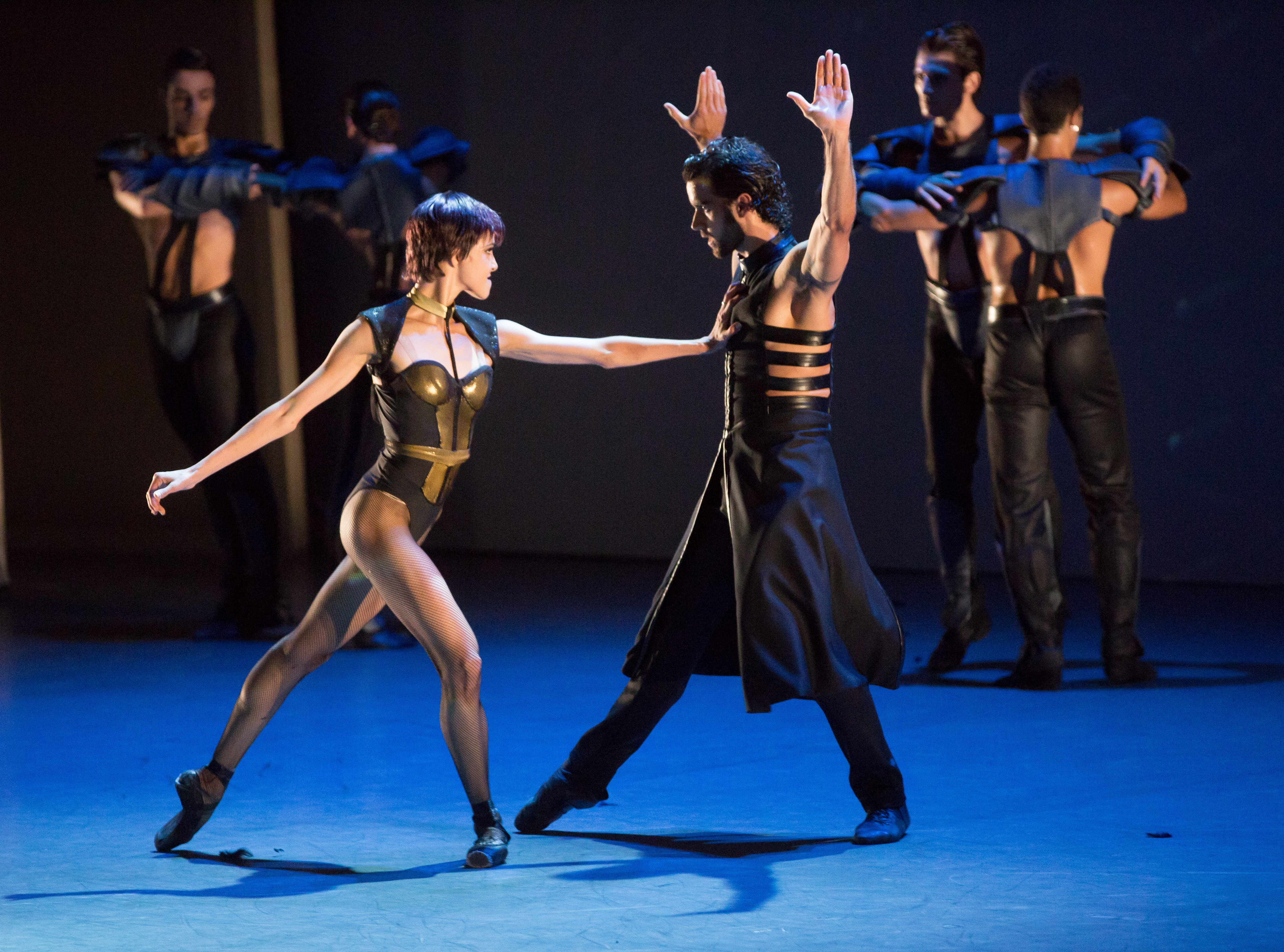 ©Quincena Musical- Iñigo Ibáñez